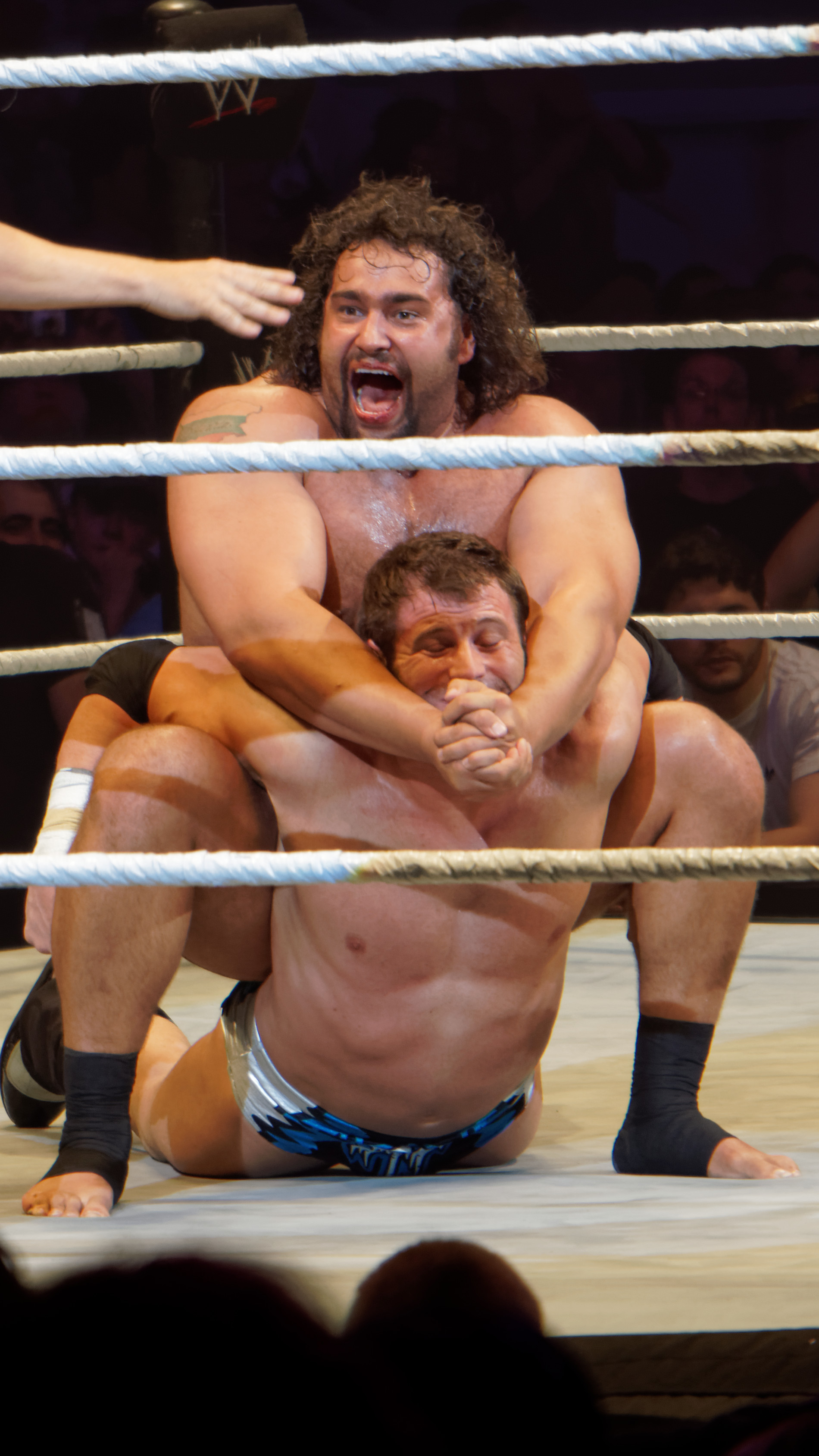 2014-05-22_20-33-23_ILCE-6000_1486_DxO